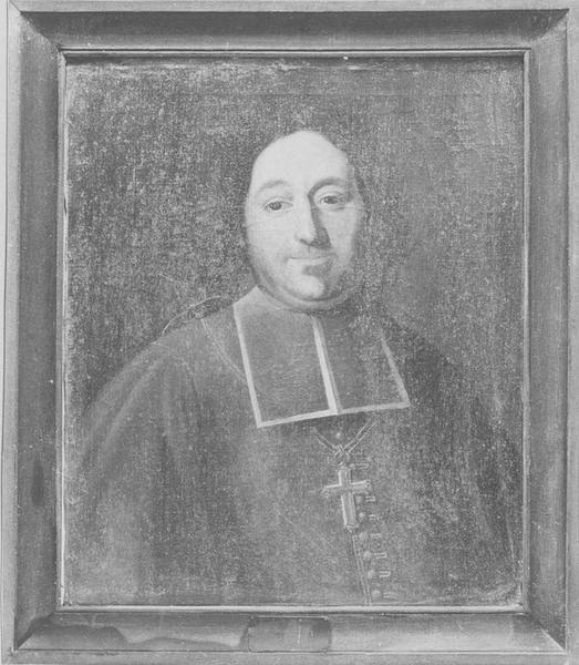 Olivier Jegou de Kervilio